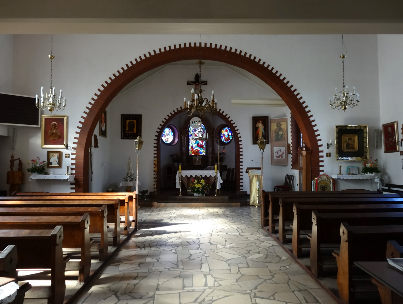 Kościół św. Stanisława Biskupa i Męczennika w Bydgoszczy, zbud. 1925 r.